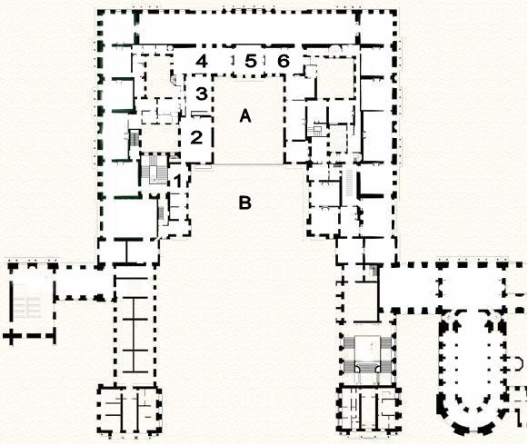 Plan de l’appartement du roi à Versailles created by elighthart 1 Vestibule or loggia 2 Salle des gardes 3 Première antichambre (salon du grand couvert) 4 Salon de l’œil de bœuf (formerly deuxième antichambre / antichambre des Bassans and chambre du roi) 5 Chambre de Louis XIV (formerly salon du roi) 6 Salon du conseil (formerly cabinet des glaces and cabinet des termes) A Cour de marbre B Cour royale